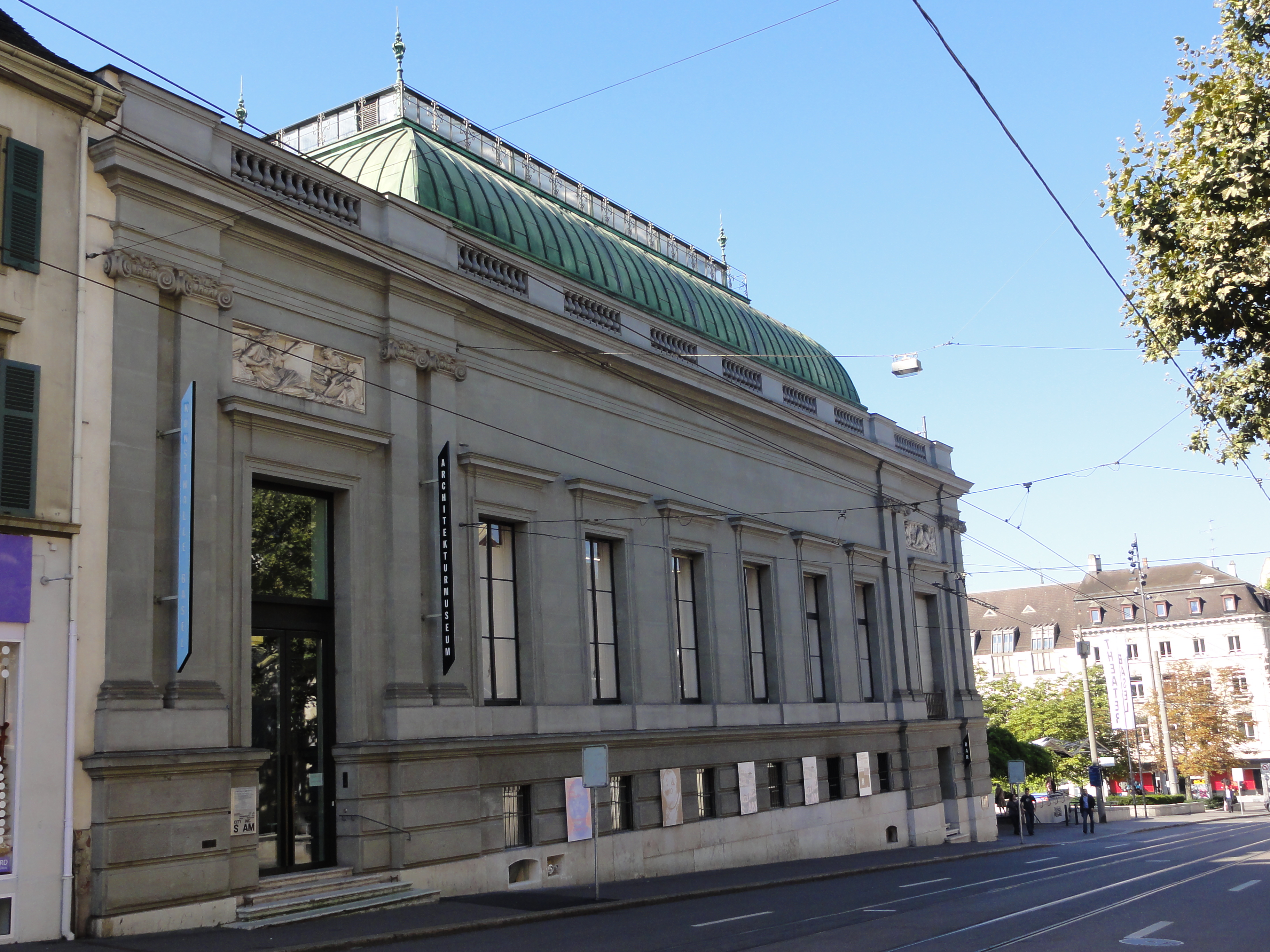 Basel Stadt — Kunsthalle EXIF data with GPS coordinates and magnetic direction. GPS data may be inaccurate.